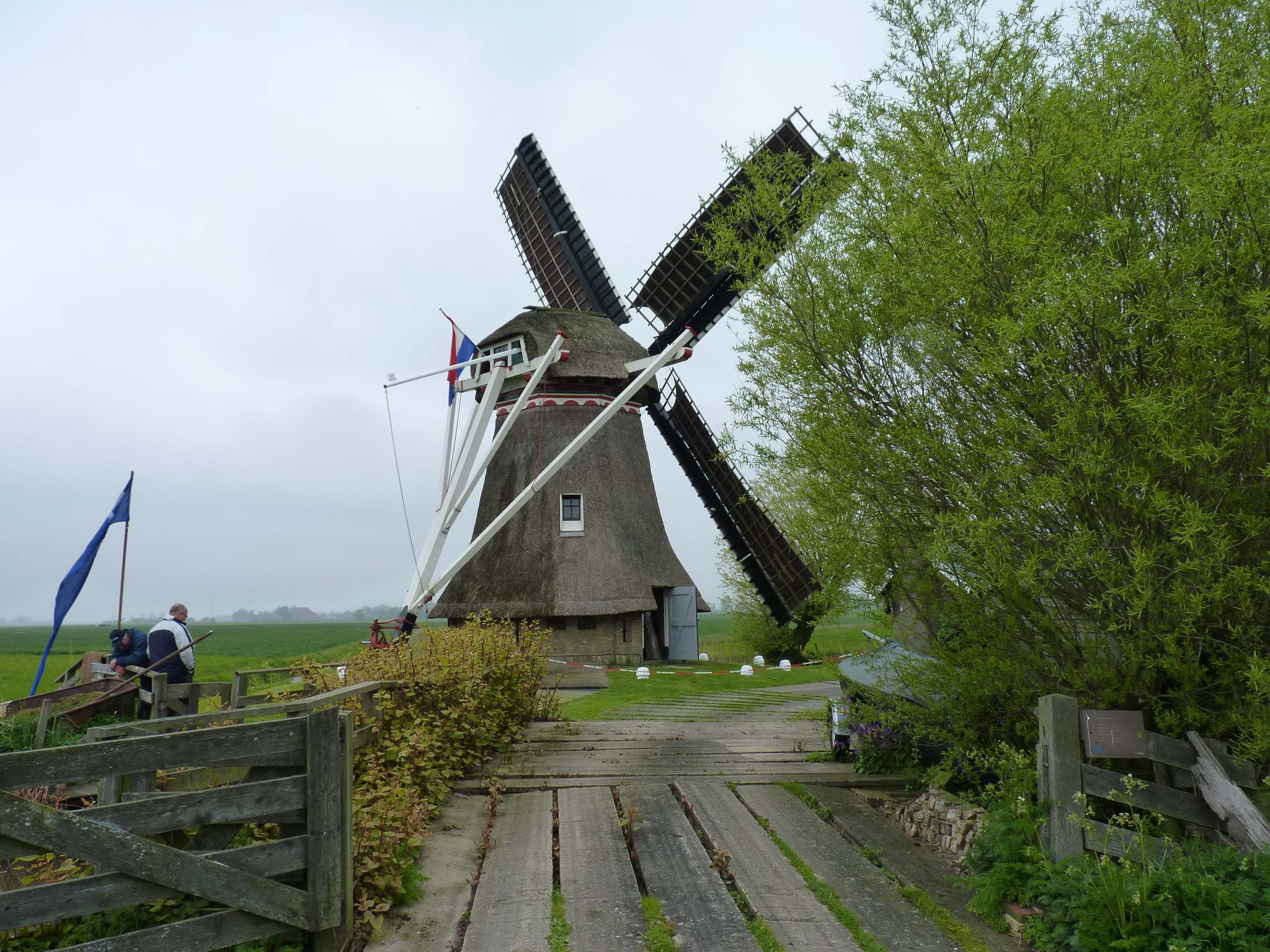 Hogebeintum Poldermolen Hogebeintumermolen